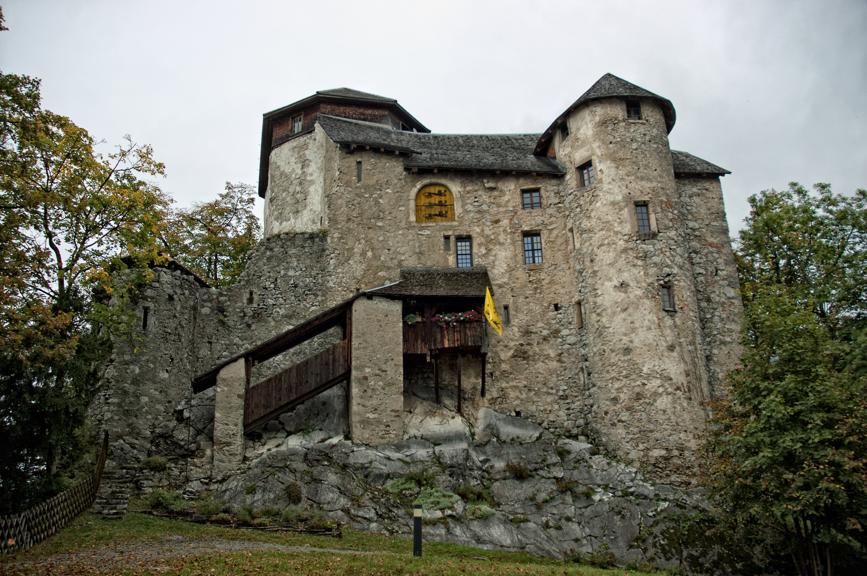 Hohenems, Burg Neu-Ems ("Schloss Glopper") Dieses Bild wurde anlässlich des österreichischen Tags des Denkmals 2012 in Vorarlberg eingereicht.